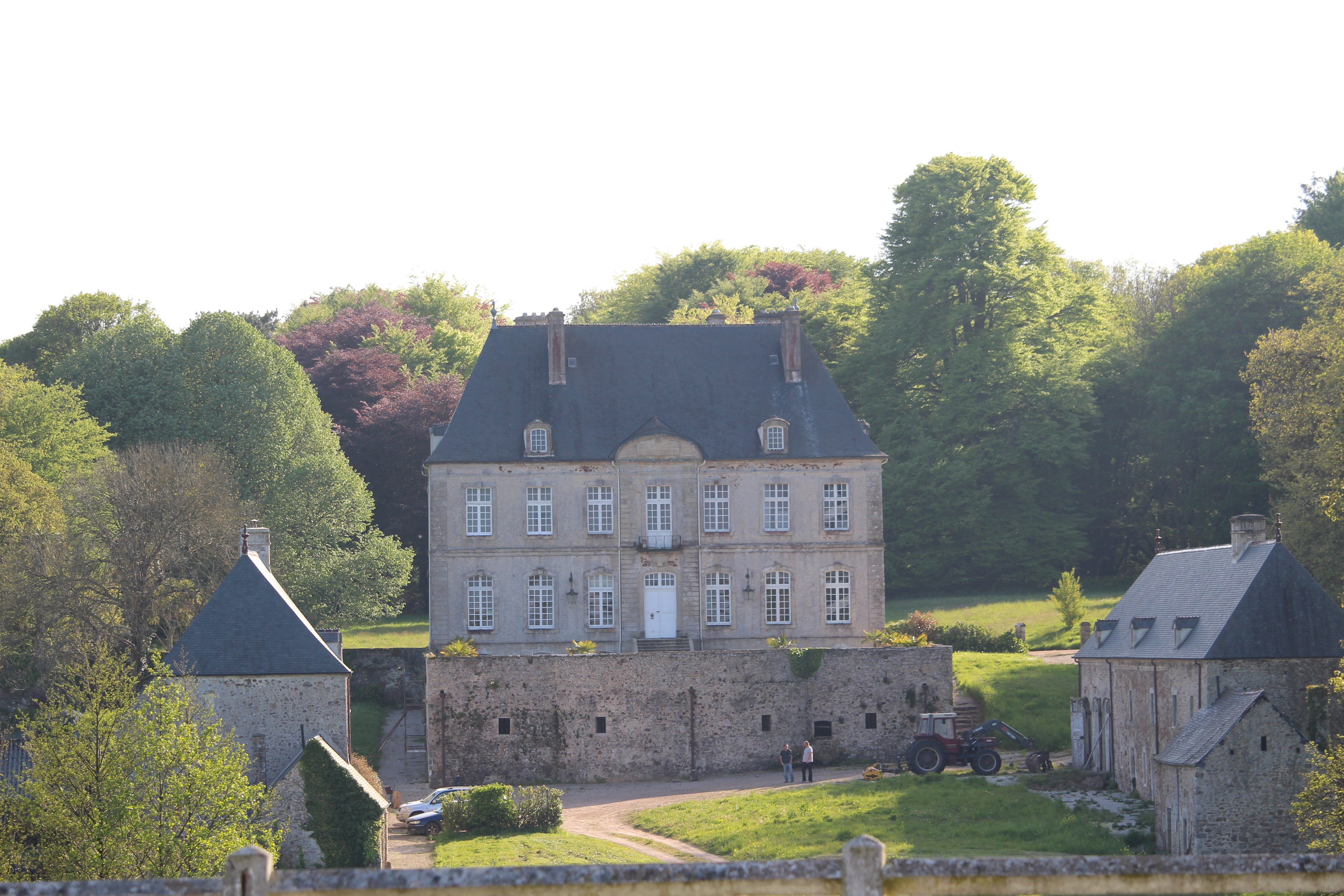 Château de Tourville, Lestre, Manche .